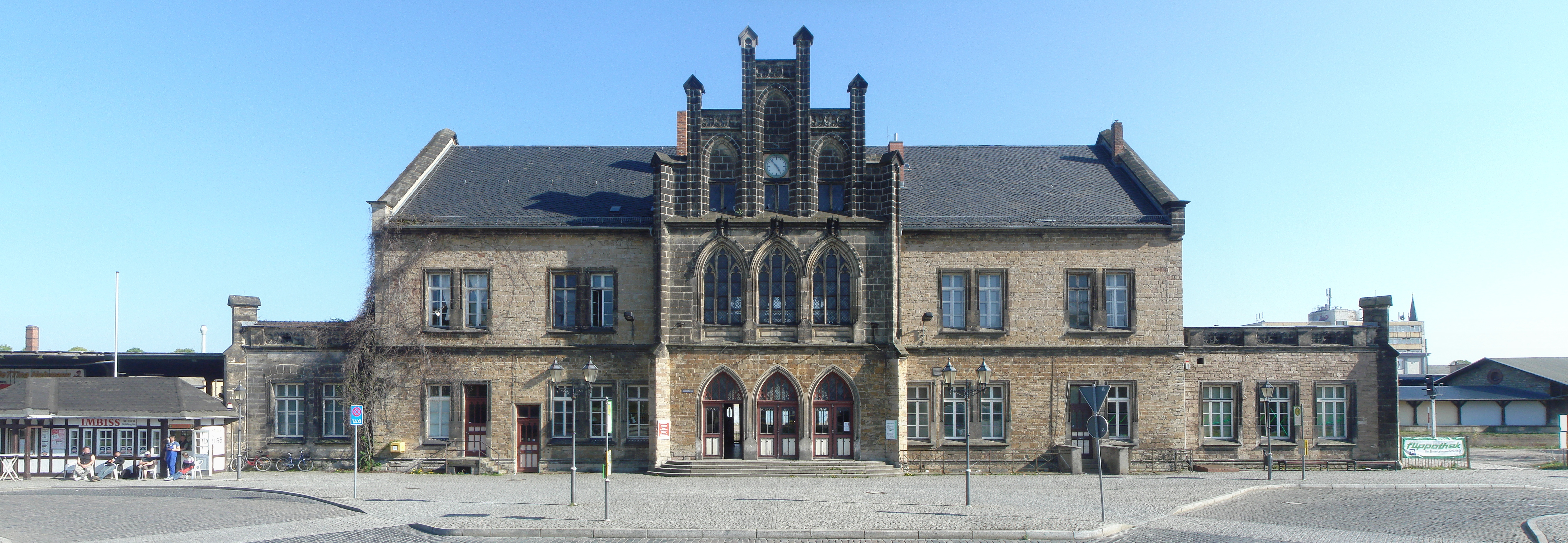 Bahnhof Quedlinburg, großes Panorama. Siehe auch File:Bahnhof Quedlinburg 2009 Kleines Panorama.jpg.